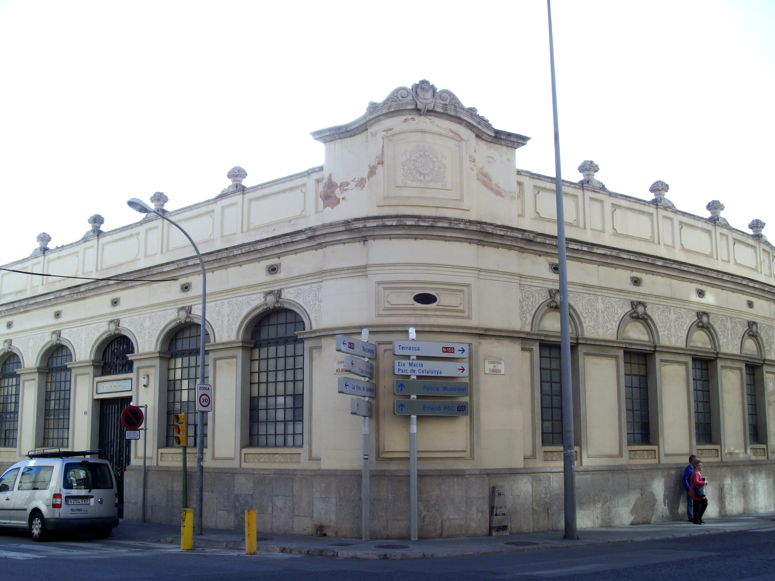 Fábrica Camps Hermanos, sucesor, dedicada a la industria textil lanera, situada en la crt. de Terrassa, 1-9 / crt. de Molins de Rei, 2-4 / calle de Sant Jordi, en Sabadell, Barcelona (España).